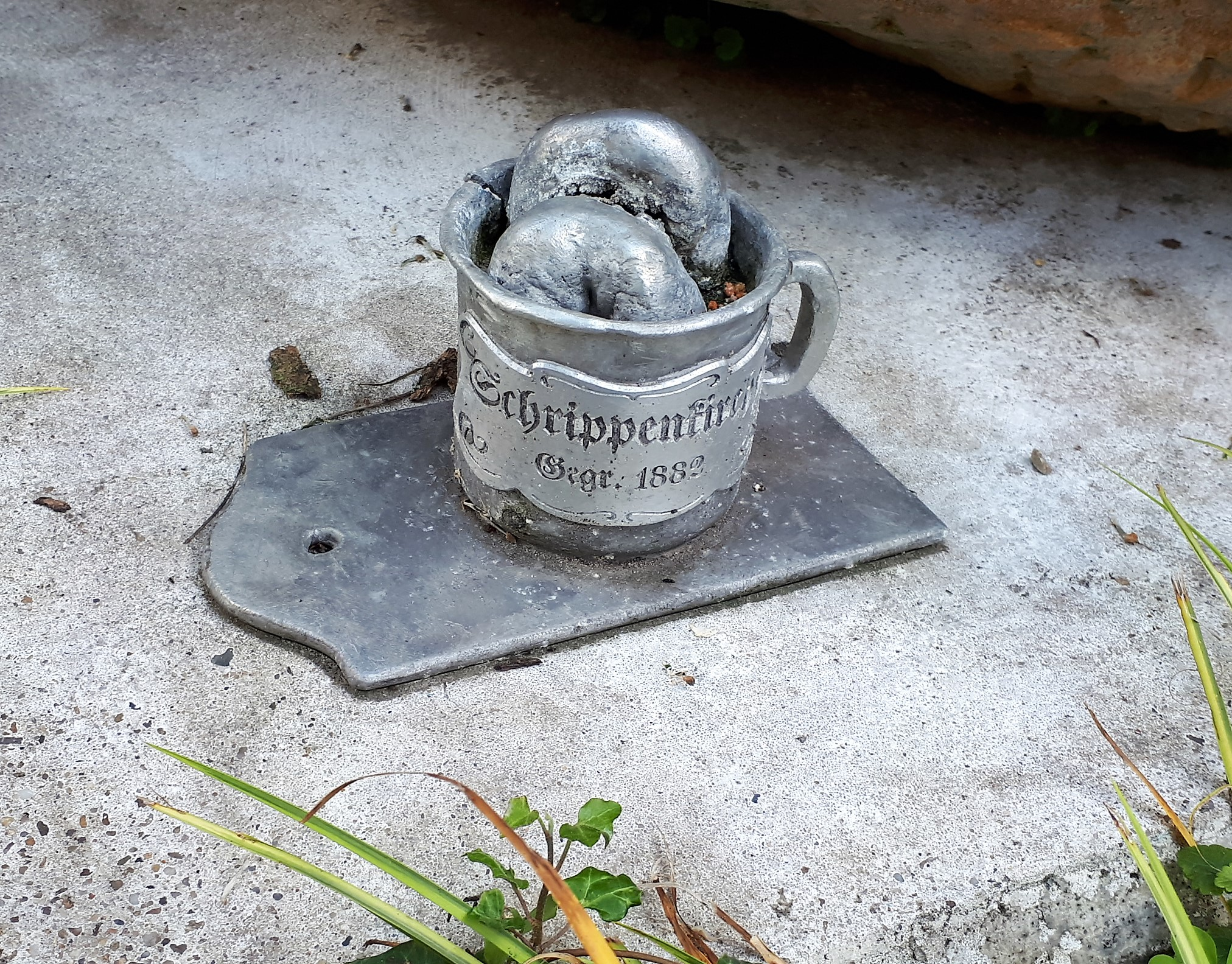 Gesundbrunnen Ackerstraße Kaffeebecher zur Erinnerung an die alte Schrippenkirche